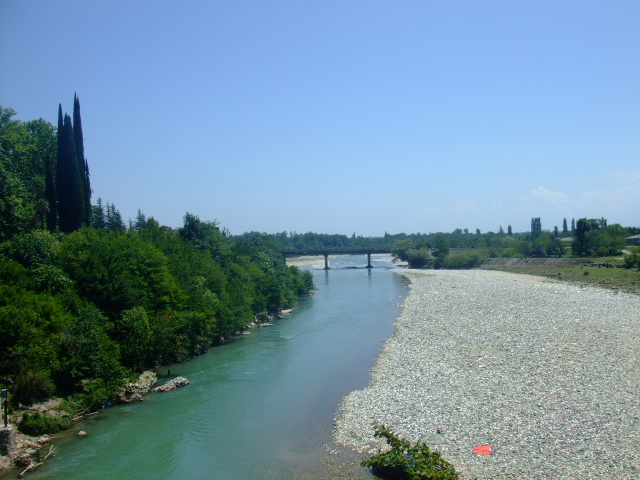 Nokalakevi, river Tekhura